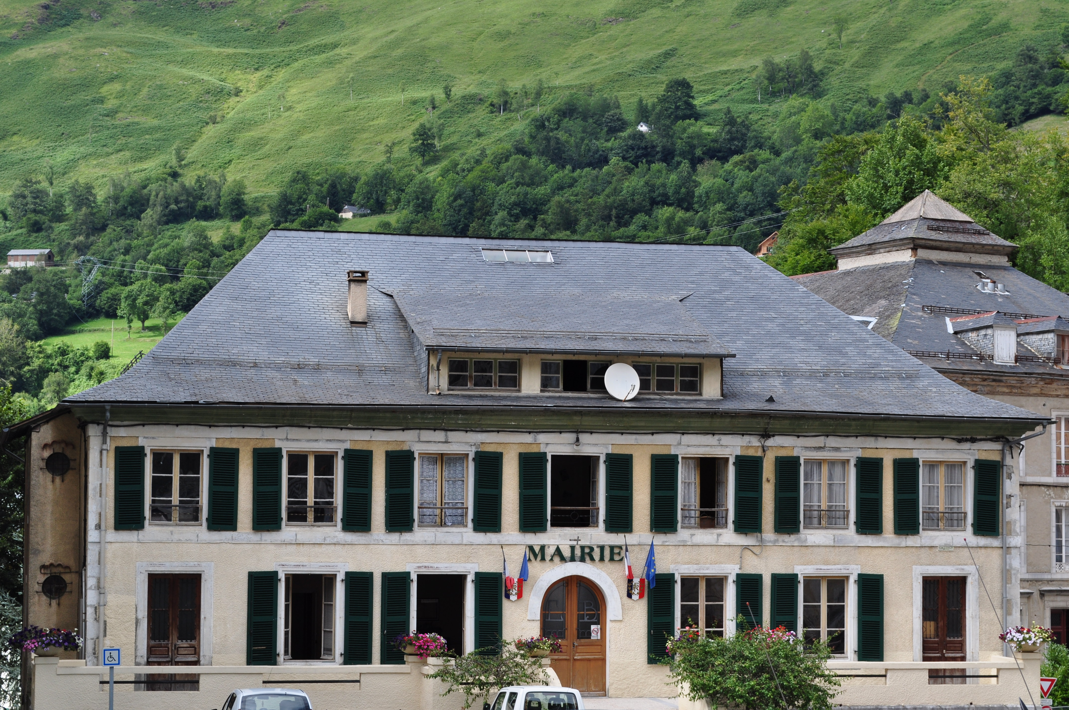 Autres photos de la mairie de Eaux-Bonnes, daté de 2010